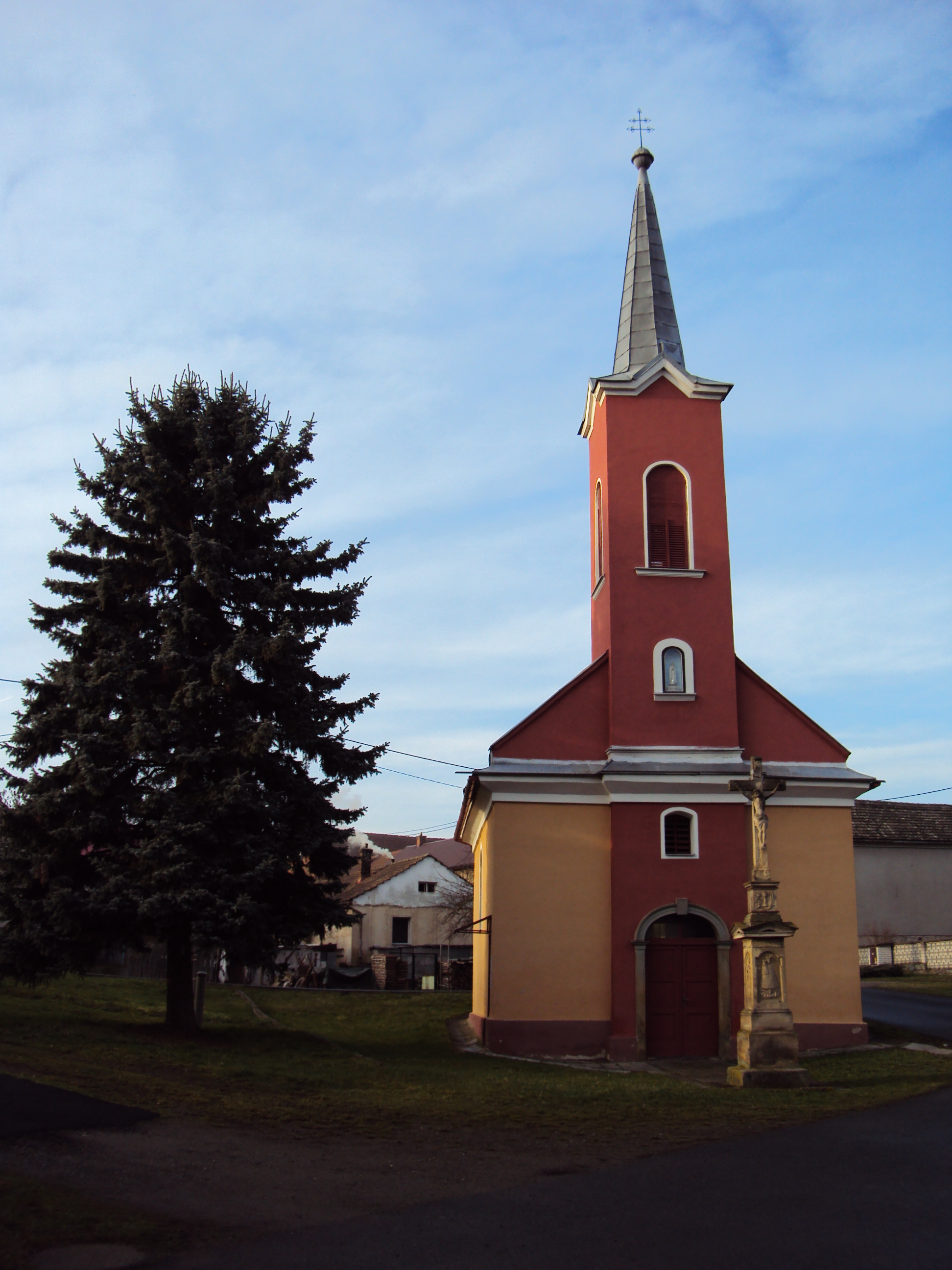 Lukavice (SU), Slavoňov, kaple Panny Marie Pomocnice křesťanů s křížem